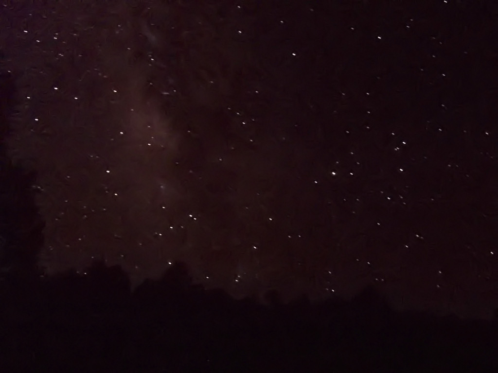 Cielo nocturno en Sierra Fría